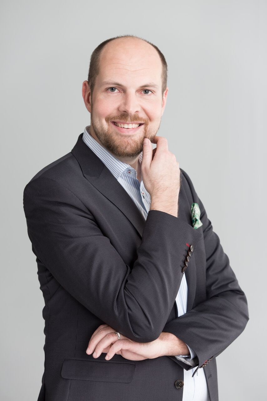 Kansanedustaja Tuomo Puumala